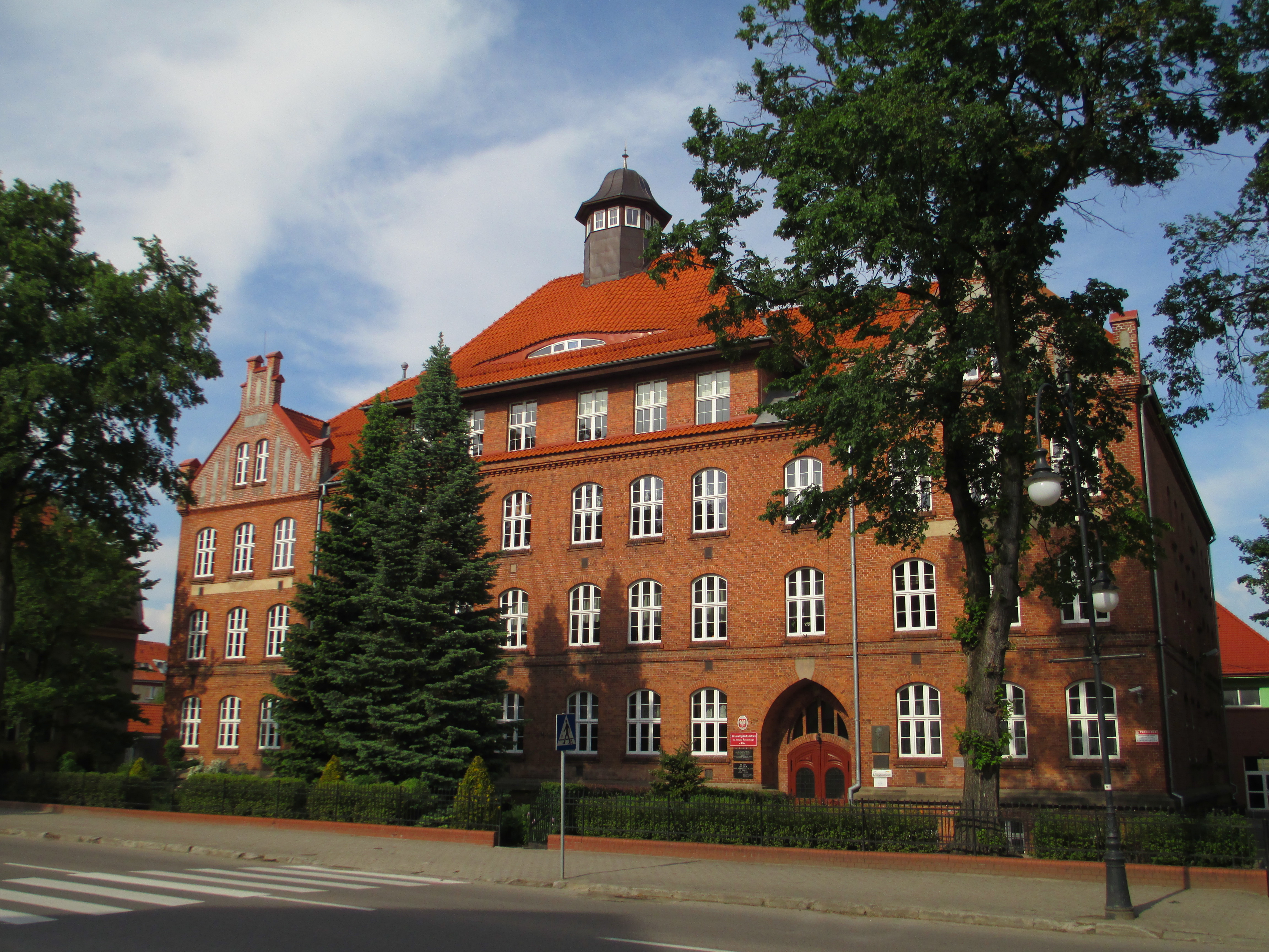 Ełk - I Liceum